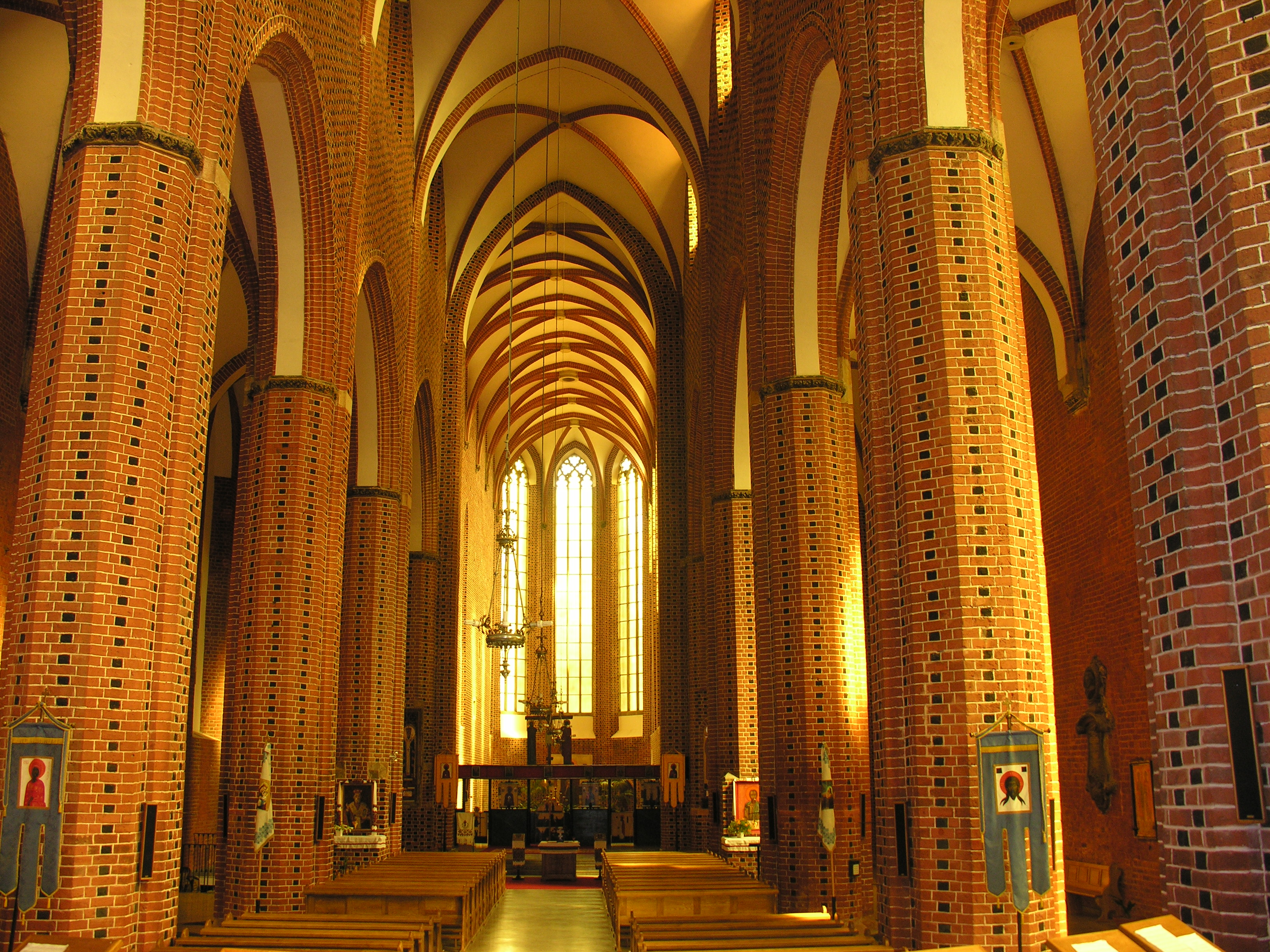 Wrocław Stare Miasto, pl. Nankiera 15 - dawny kościół św. Jakuba i Wincentego, obecnie katedra obrządku greckokatolickiego wraz z kaplicą Mariacką (Hochberga)